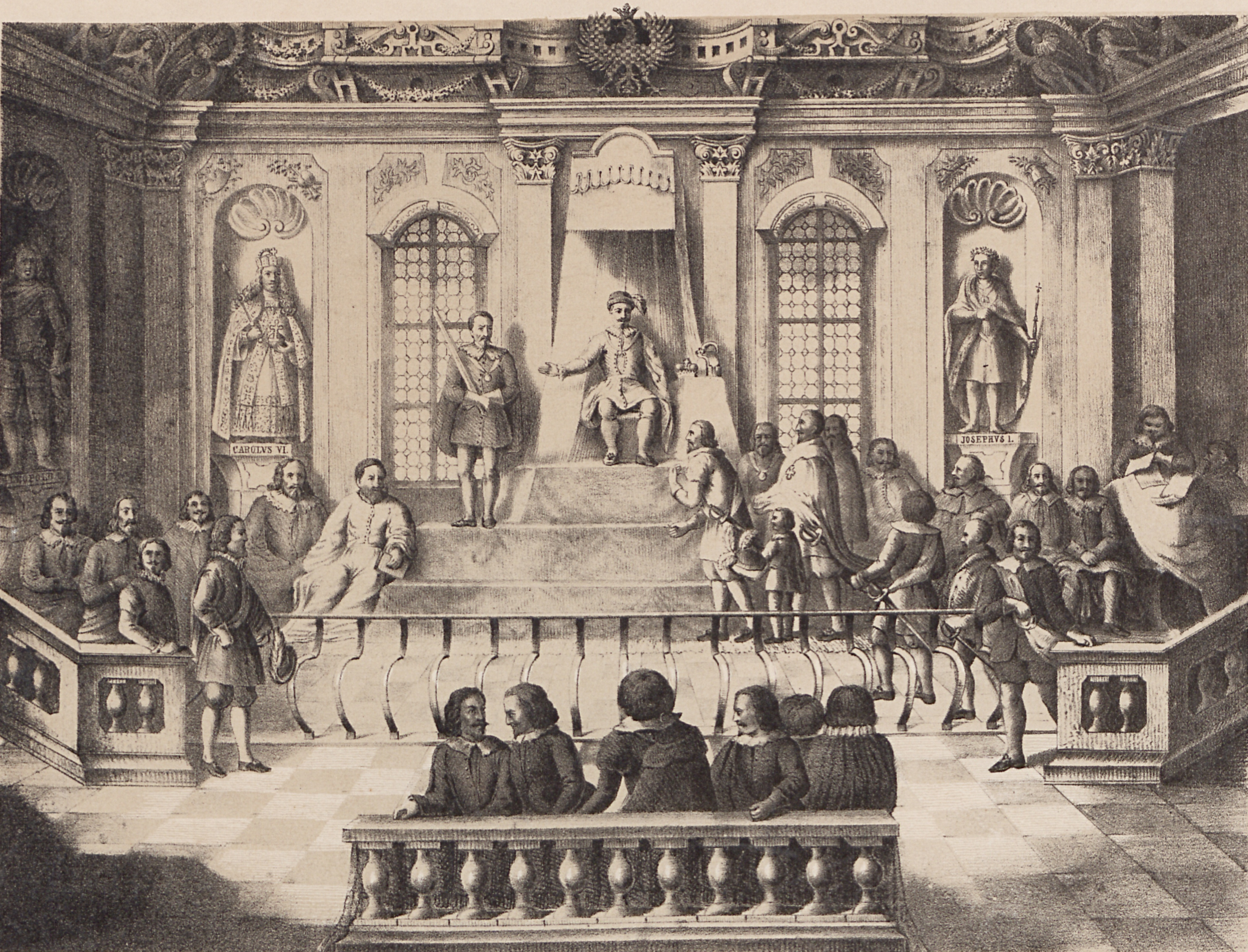 MZA v Brně, G 126 Sbírka rytin a obrazů, inv. č. 34, Velké zemské právo Moravské. Kresba z roku 1858. Kopie Mořice Viléma Trappa dnes neexistující fresky ze 30. let. 18. století od neznámého autora v tribunální síni Starého zemského domu (dnes Nová radnice).